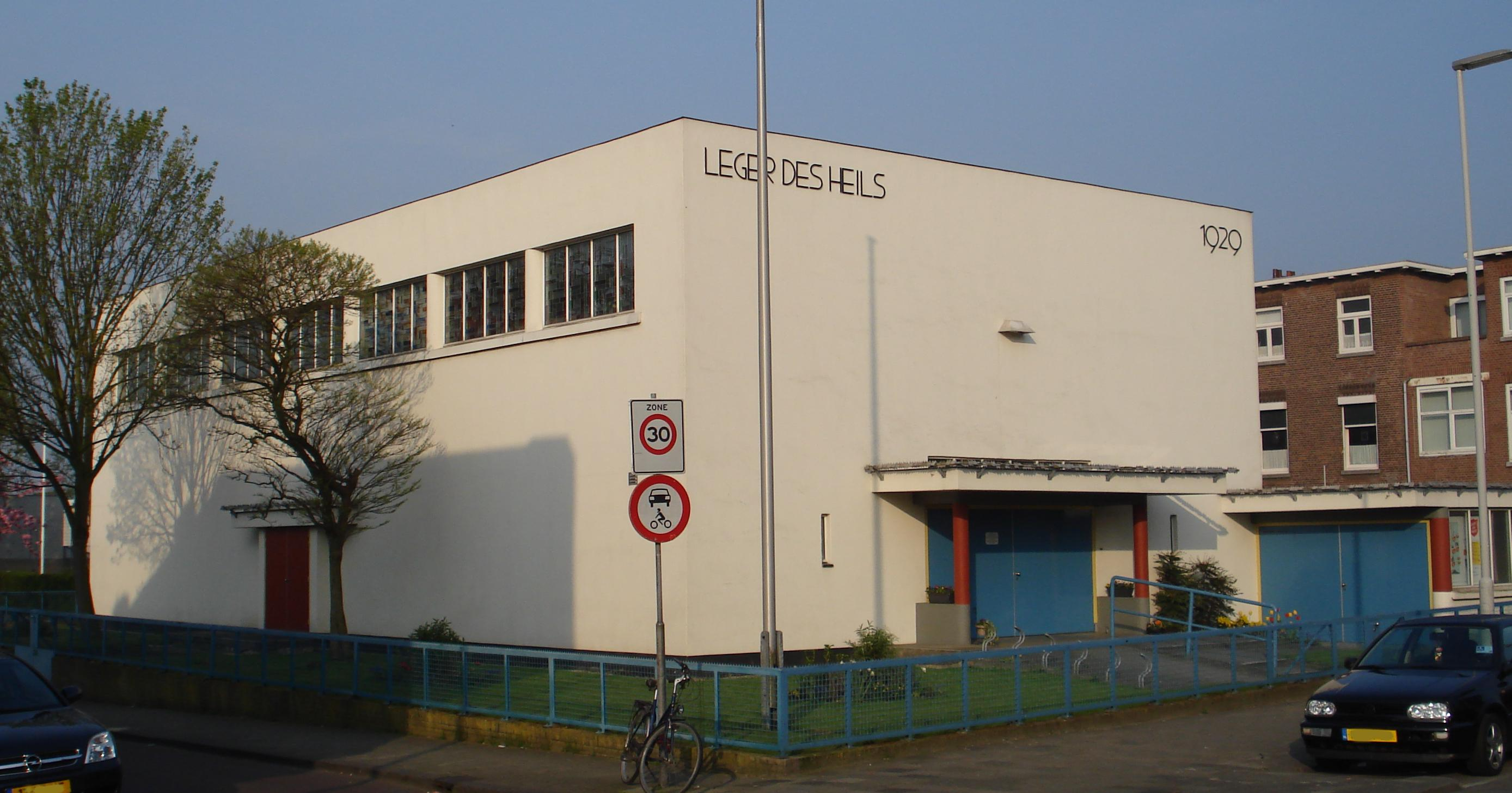 Rotterdam, Hillevliet139, kerk. Rijksmonument. Nu gebouw van het Leger des Heils.